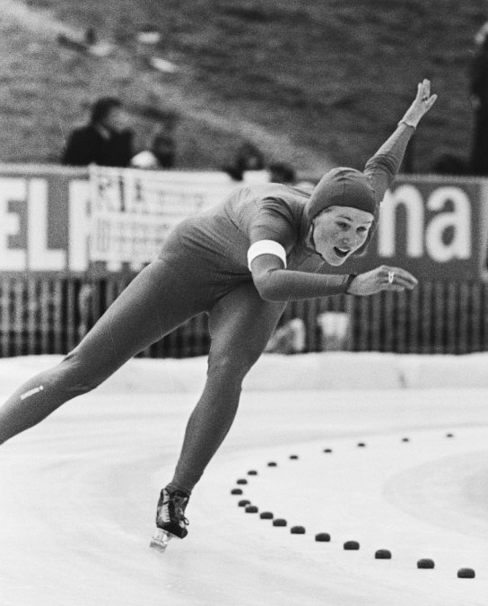 Wereldkampioenschappen schaatsen junioren allround in Assen. Bjorg Eva Jensen (Noorwegen) in actie.